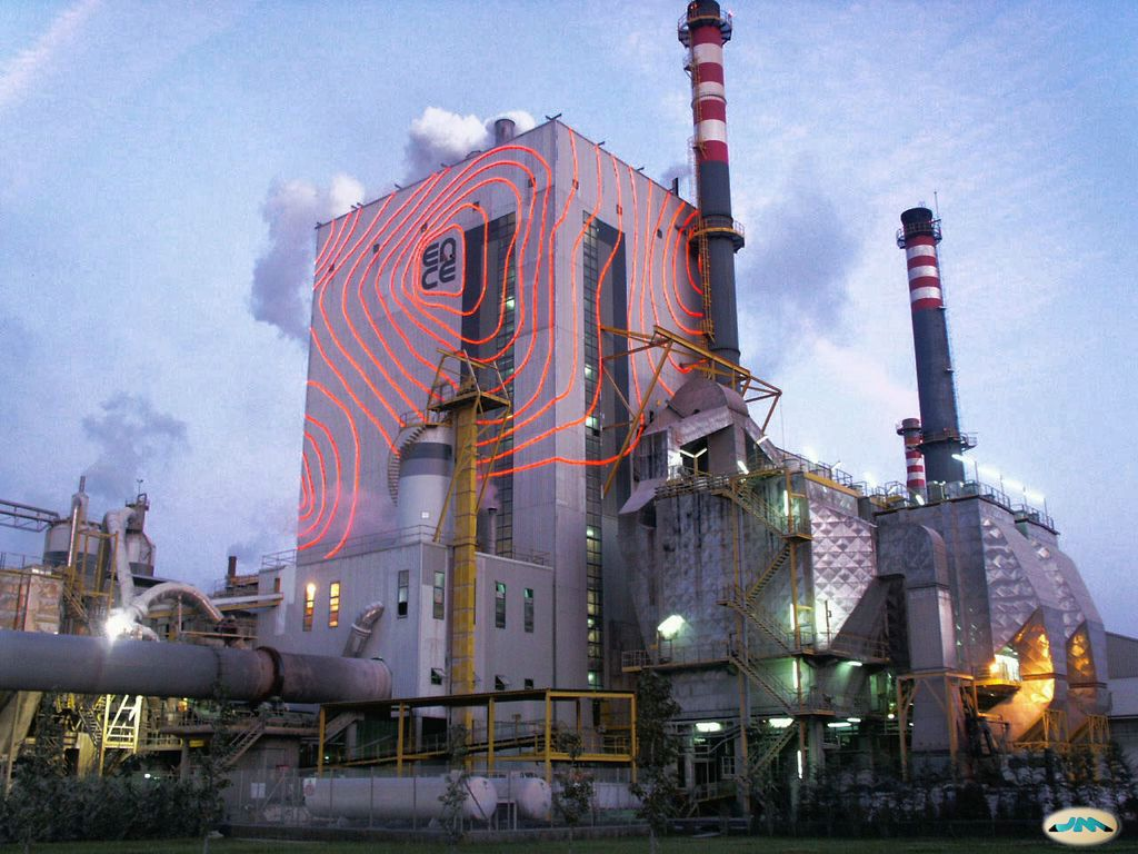 Ence, Pontevedra, Galiza, España.